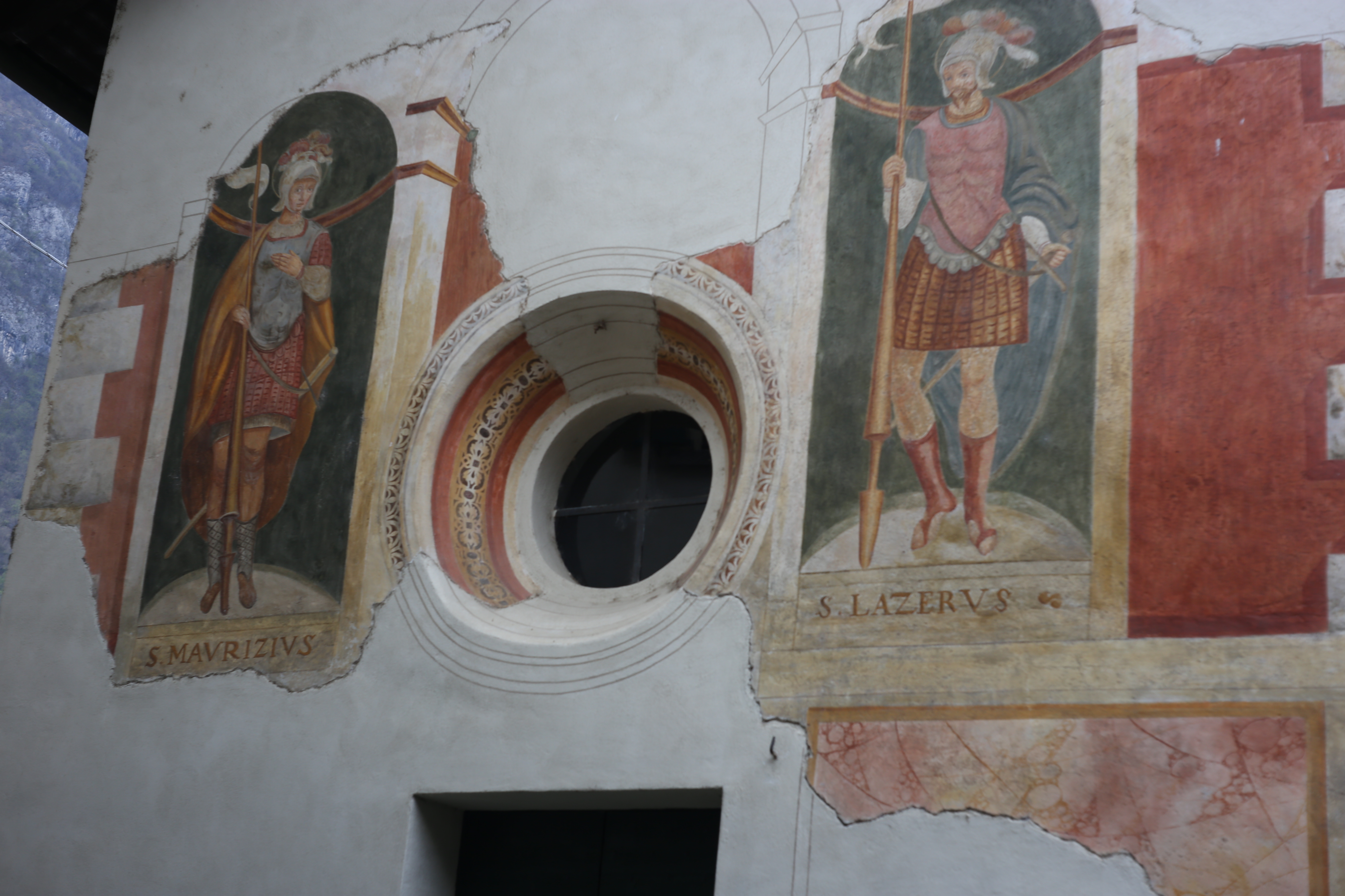 Lierna